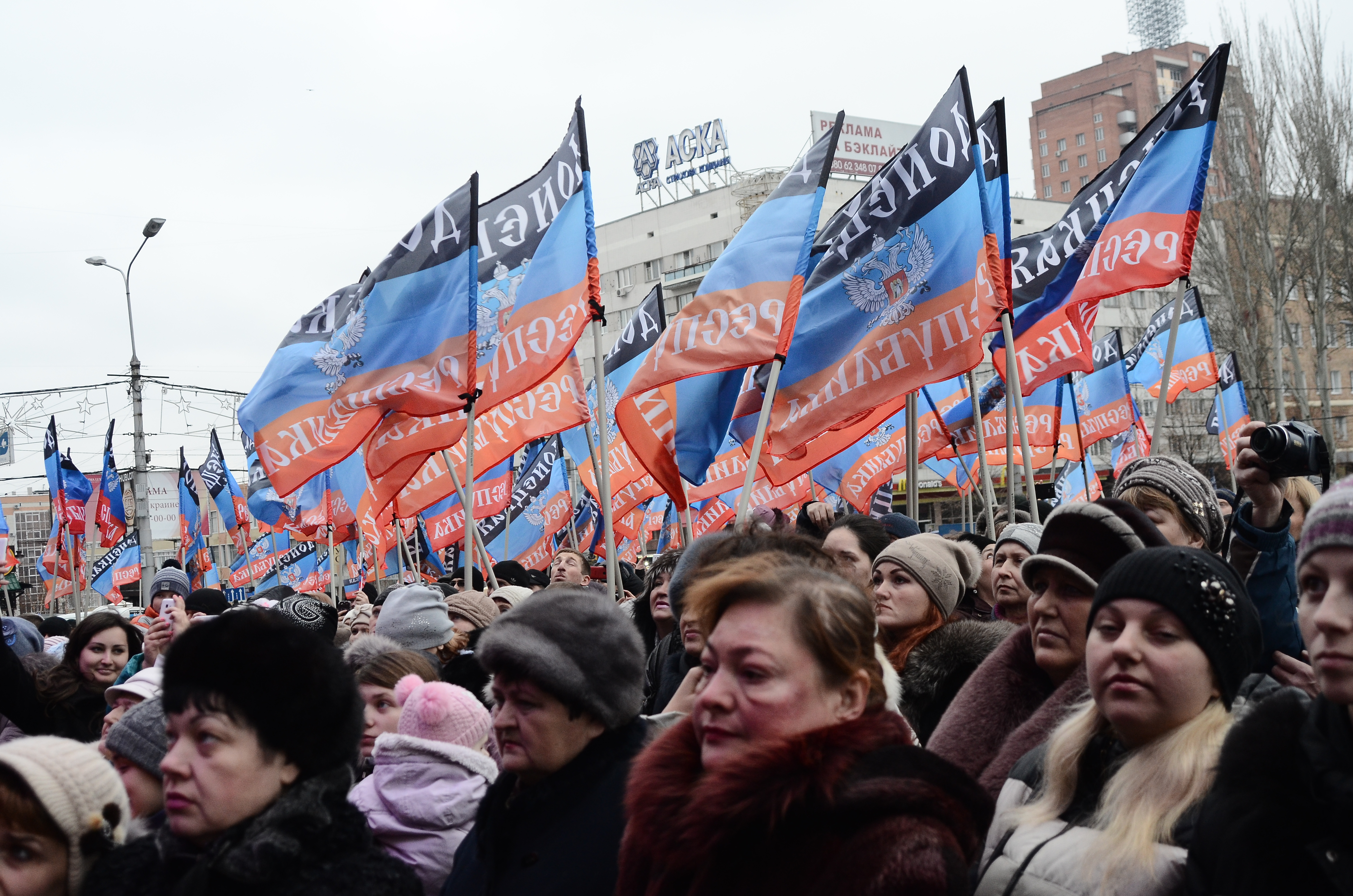 Праздник солидарности в Донецке